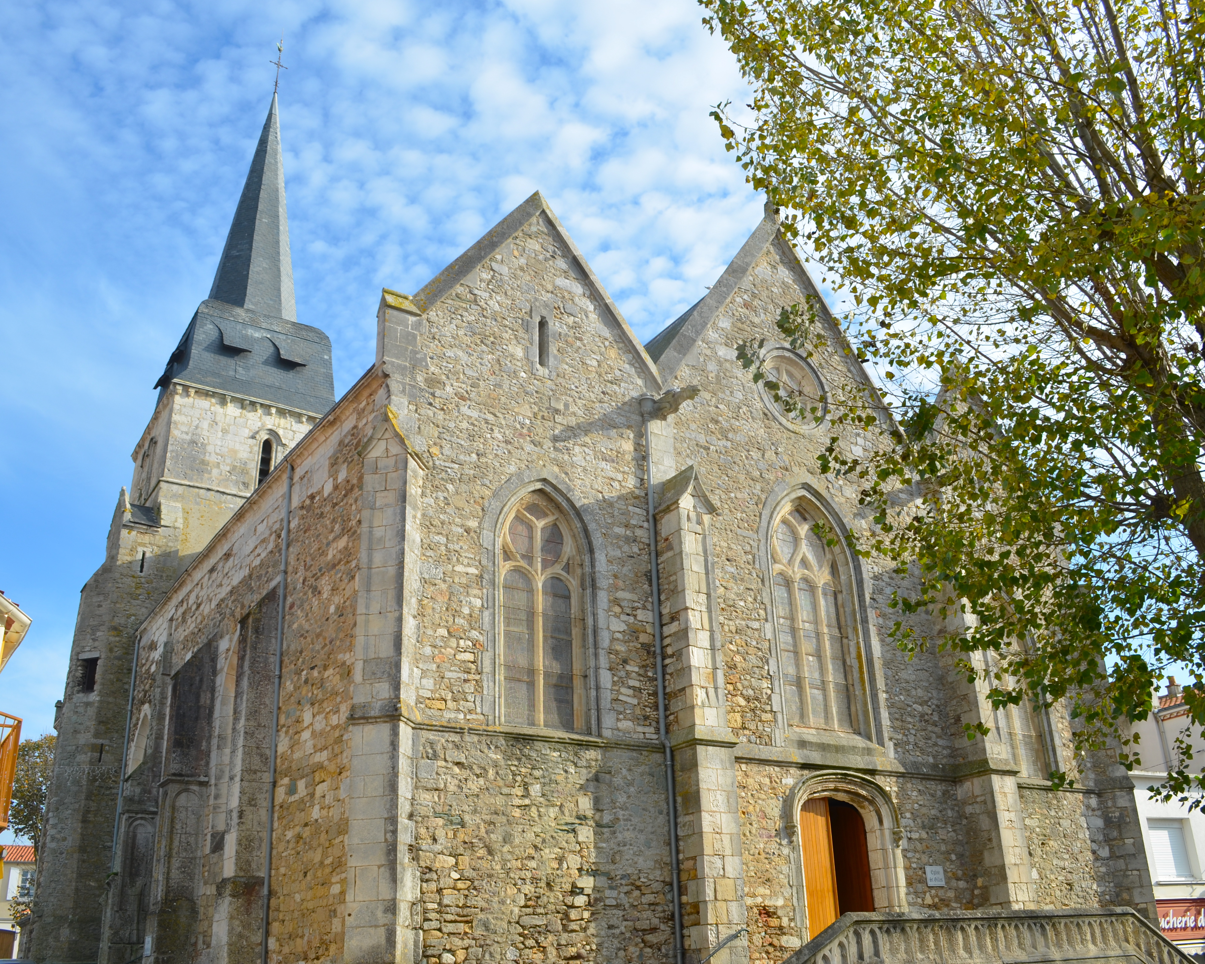 L'église Saint-Gilles de Saint-Gilles-Croix-de-Vie en Vendée.